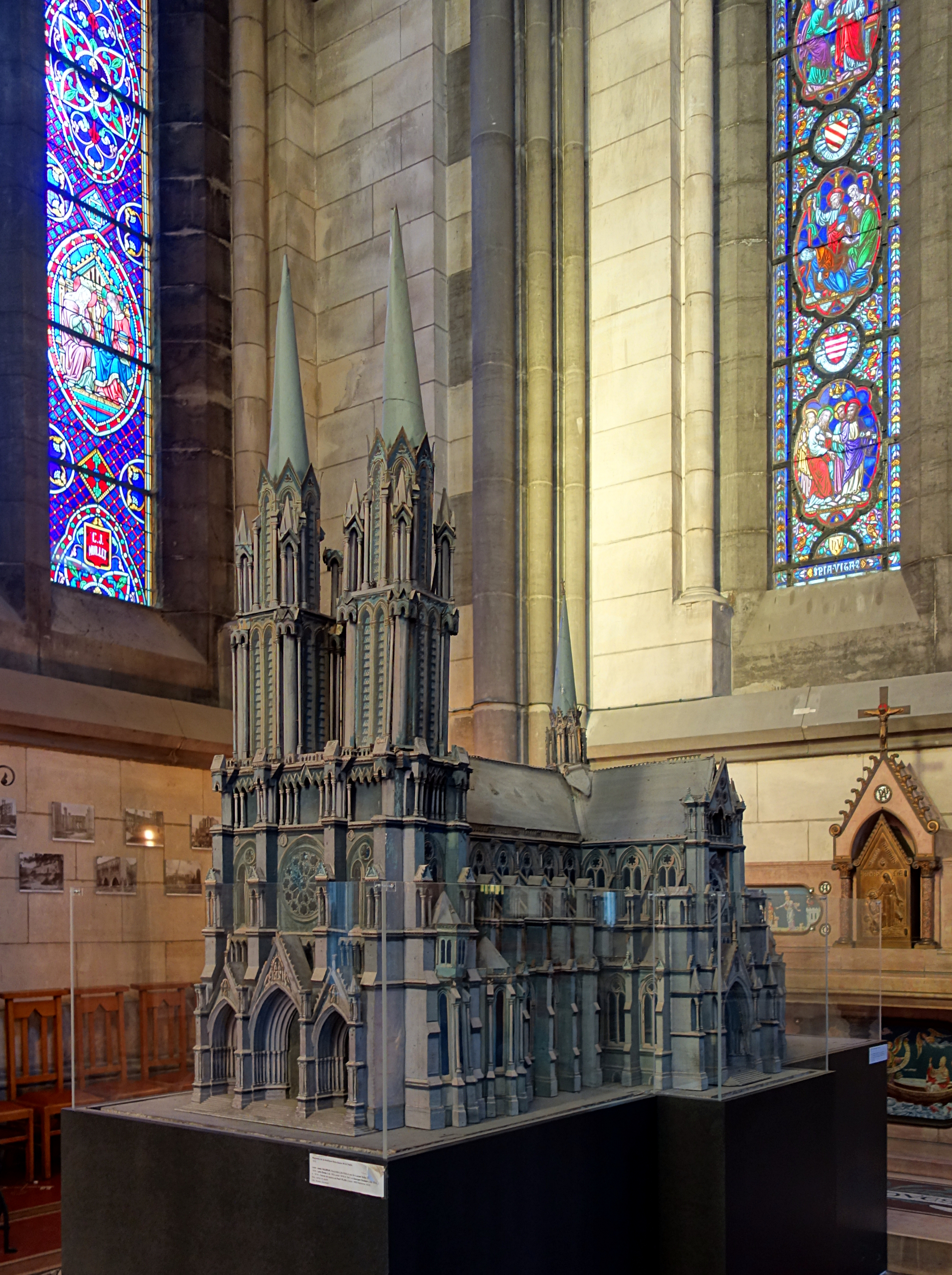 Maquette du projet initial de la cathédrale Notre-Dame-de-la-Treille à Lille.